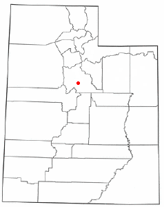 Localización de Salem, Utah